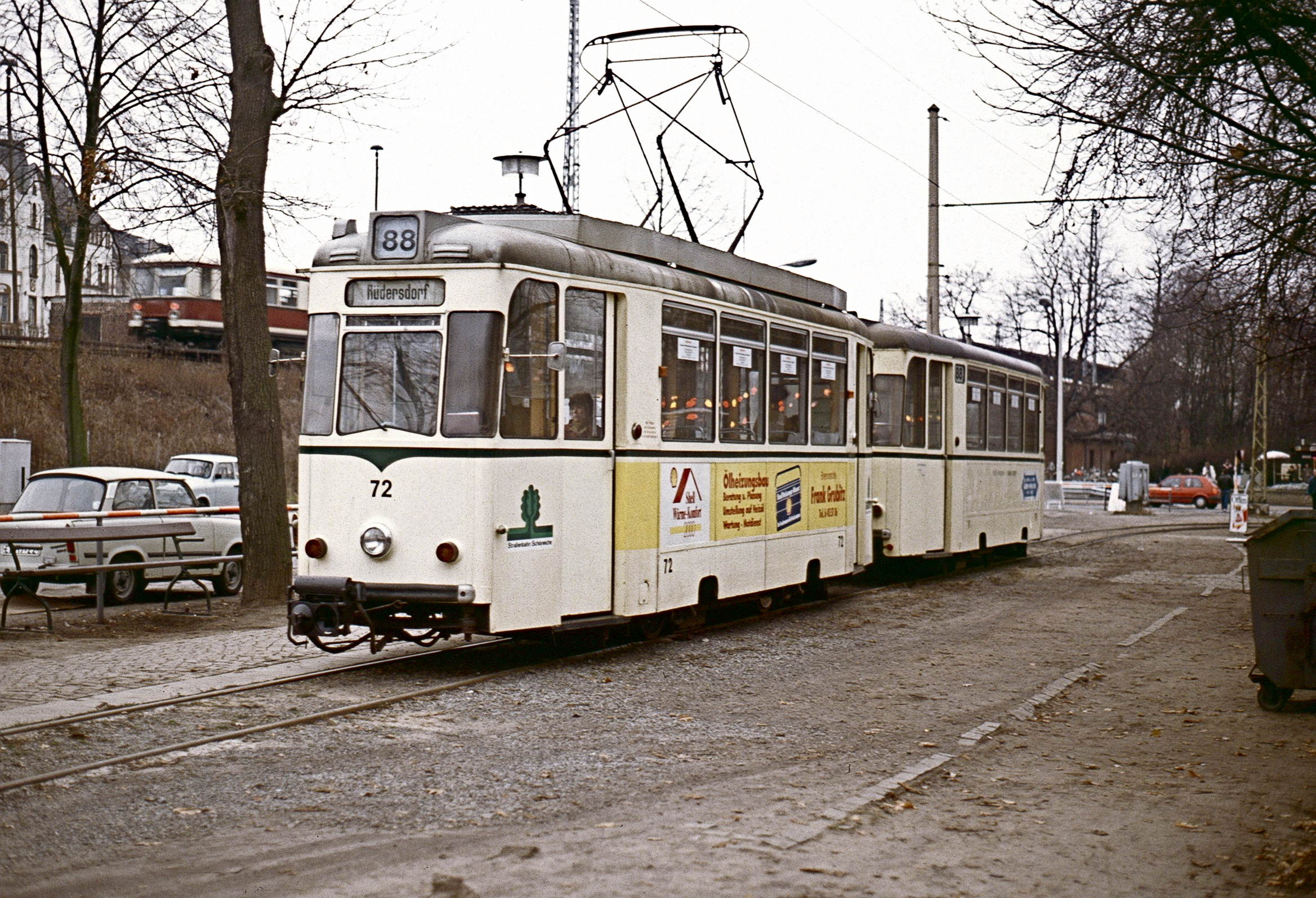 Rekowagen 72 an der Endhaltestelle Friedrichshagen